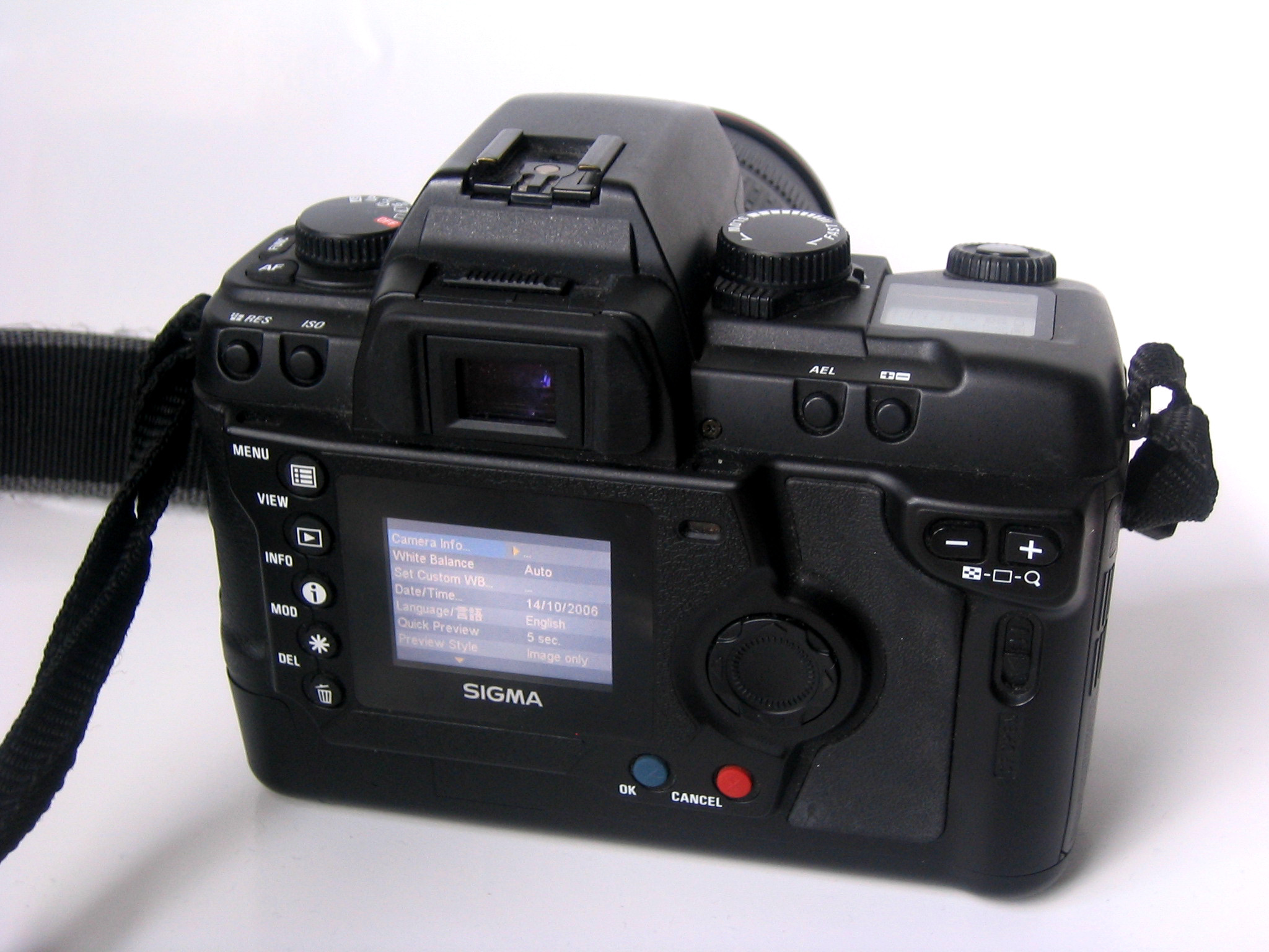 Taken by ed g2s • talk.